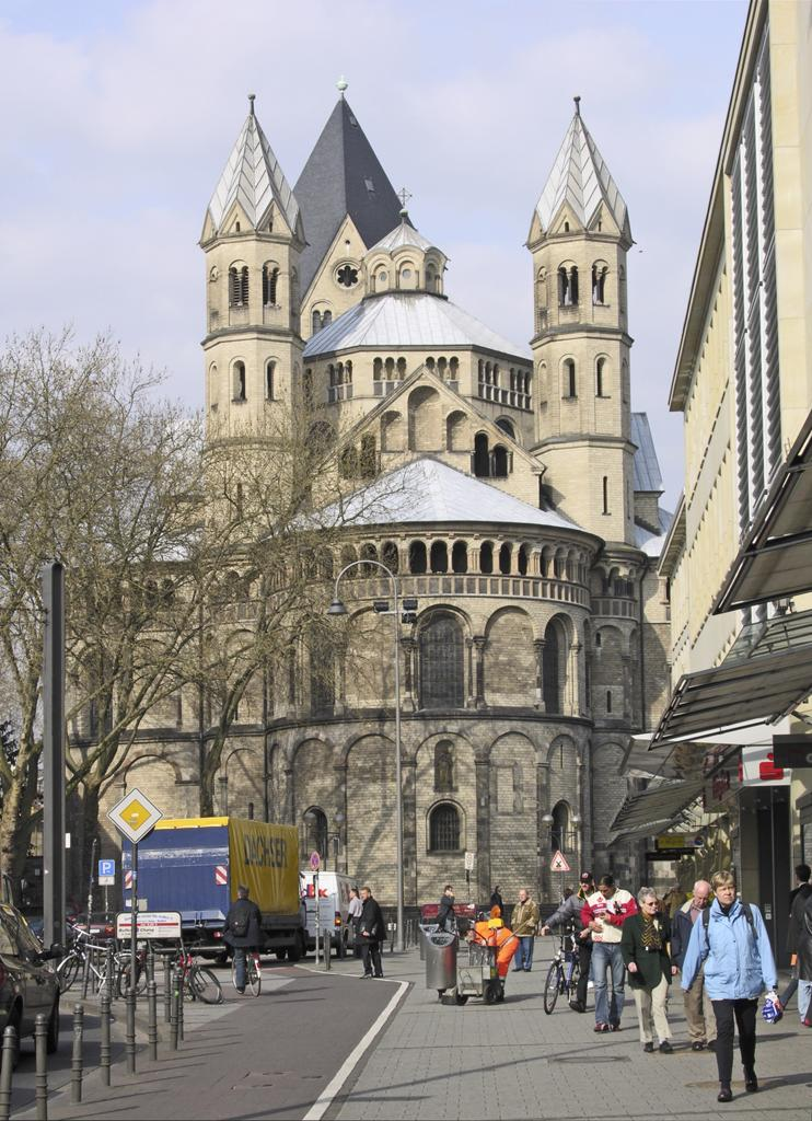 Köln, St. Aposteln